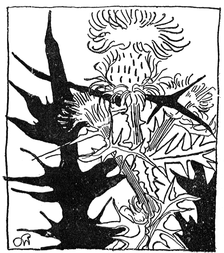 ilustracja do książki